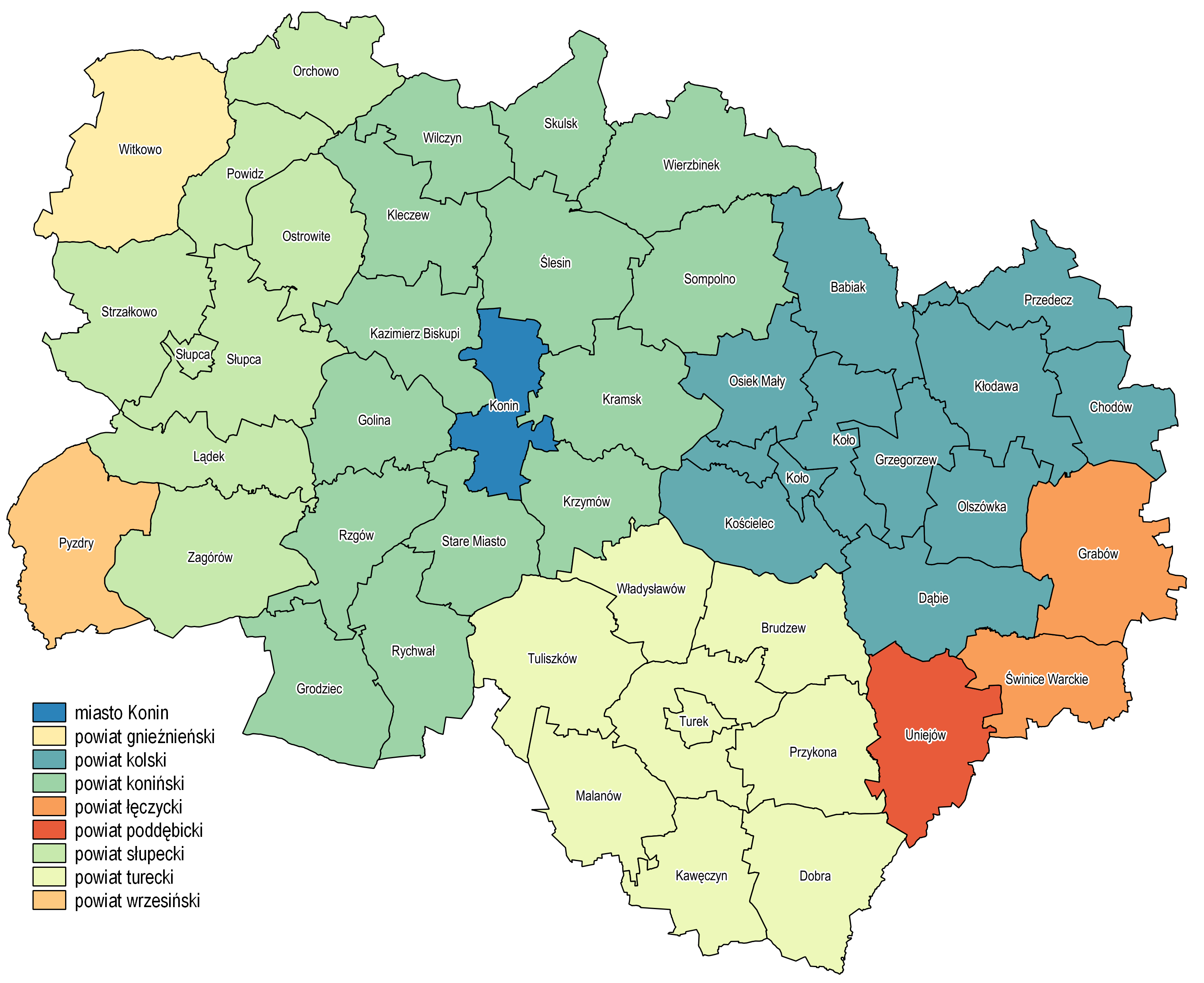 Przynależność gmin województwa konińskiego do powiatów do 1 stycznia 1999 r.